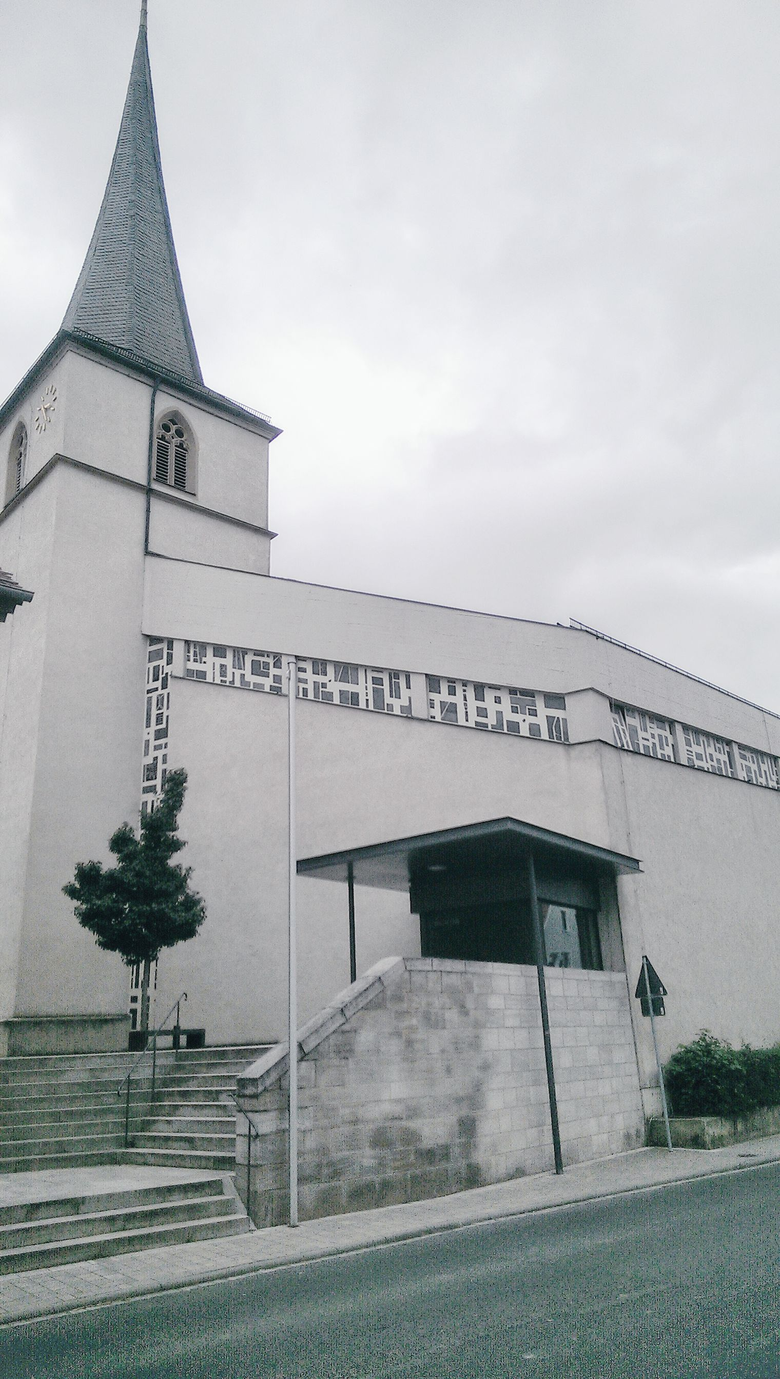 Außenansicht der Pfarrkirche St. Bartholomäus in Bergtheim von der Hauptstraße aus